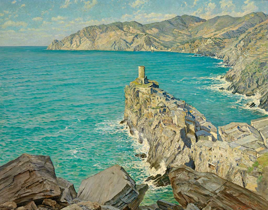 Blick auf ligurische Küstenlandschaft bei Cinque Terre (Vernazza)